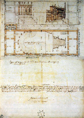 Copia del disegno preparatorio per il Teatro di Sabbioneta di Vincenzo Scamozzi.